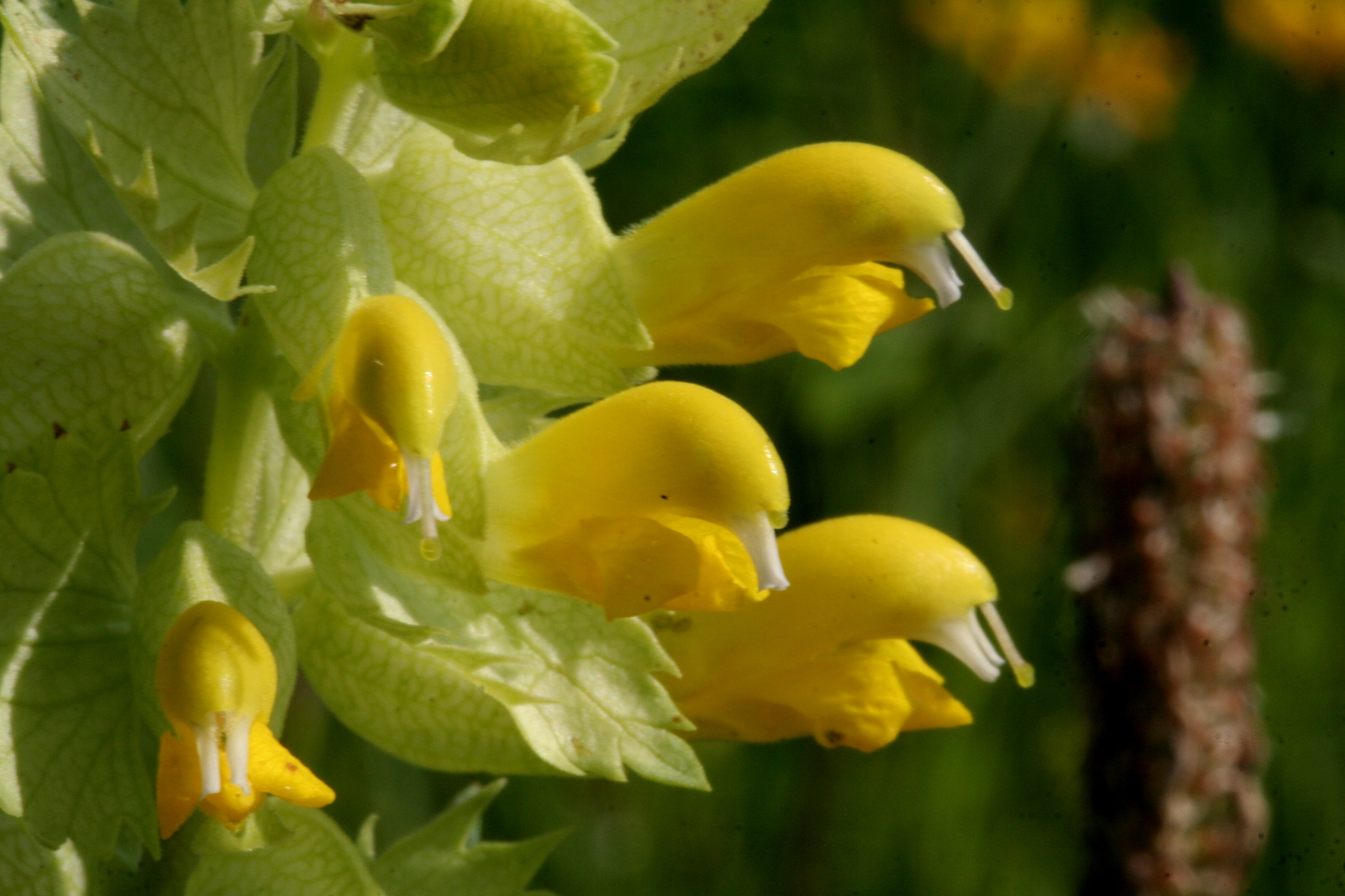 Rhinanthus_alectorolophus (Cresta di gallo comune) Località: Val Piana, Limana (BL), 850 m s.l.m.